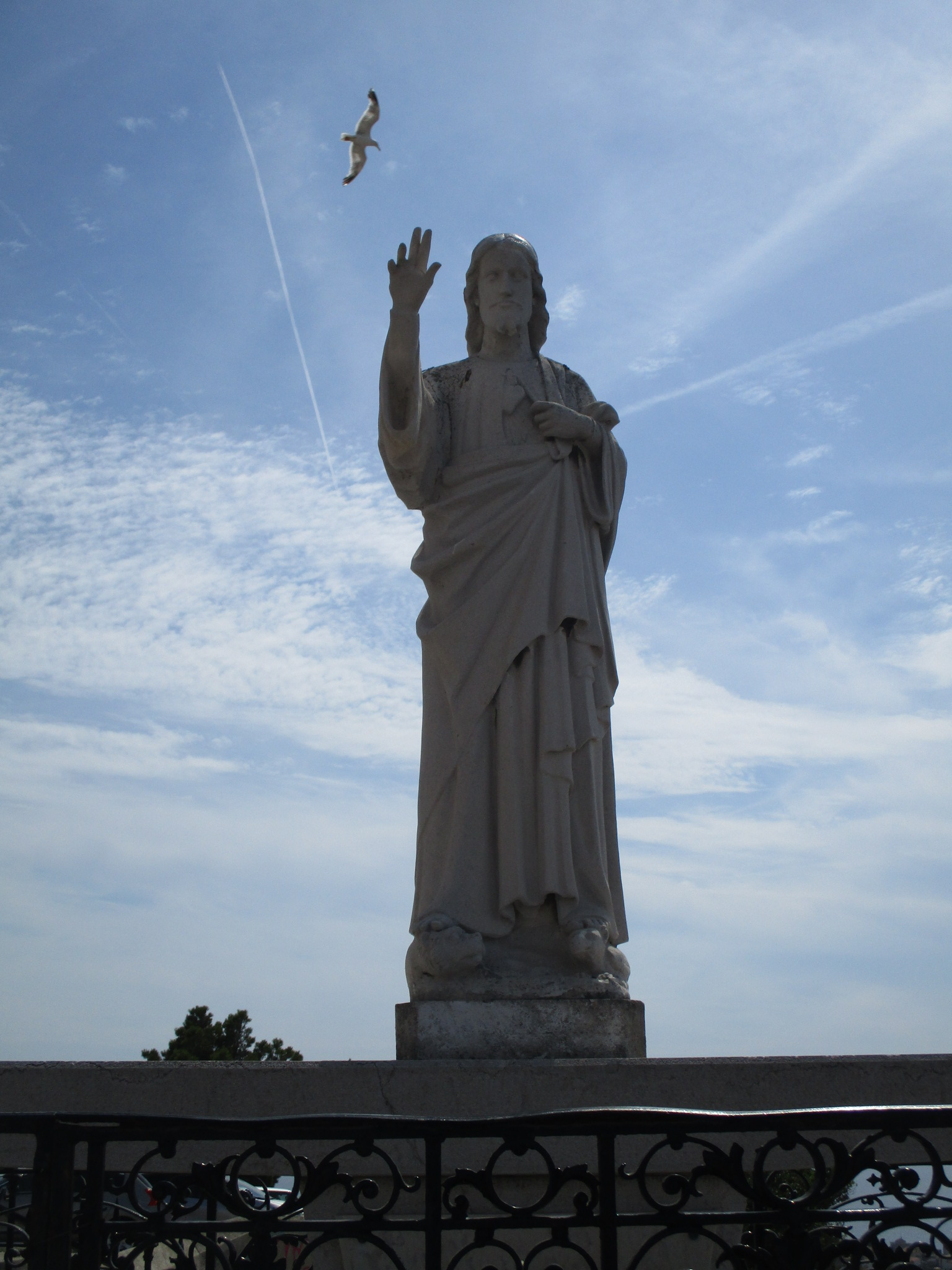 Christ sur le parvis de la basilique Notre-Dame de la Garde de Marseille